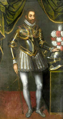 Ritratto di Emanuele Filiberto I di Savoia (1528-1580)